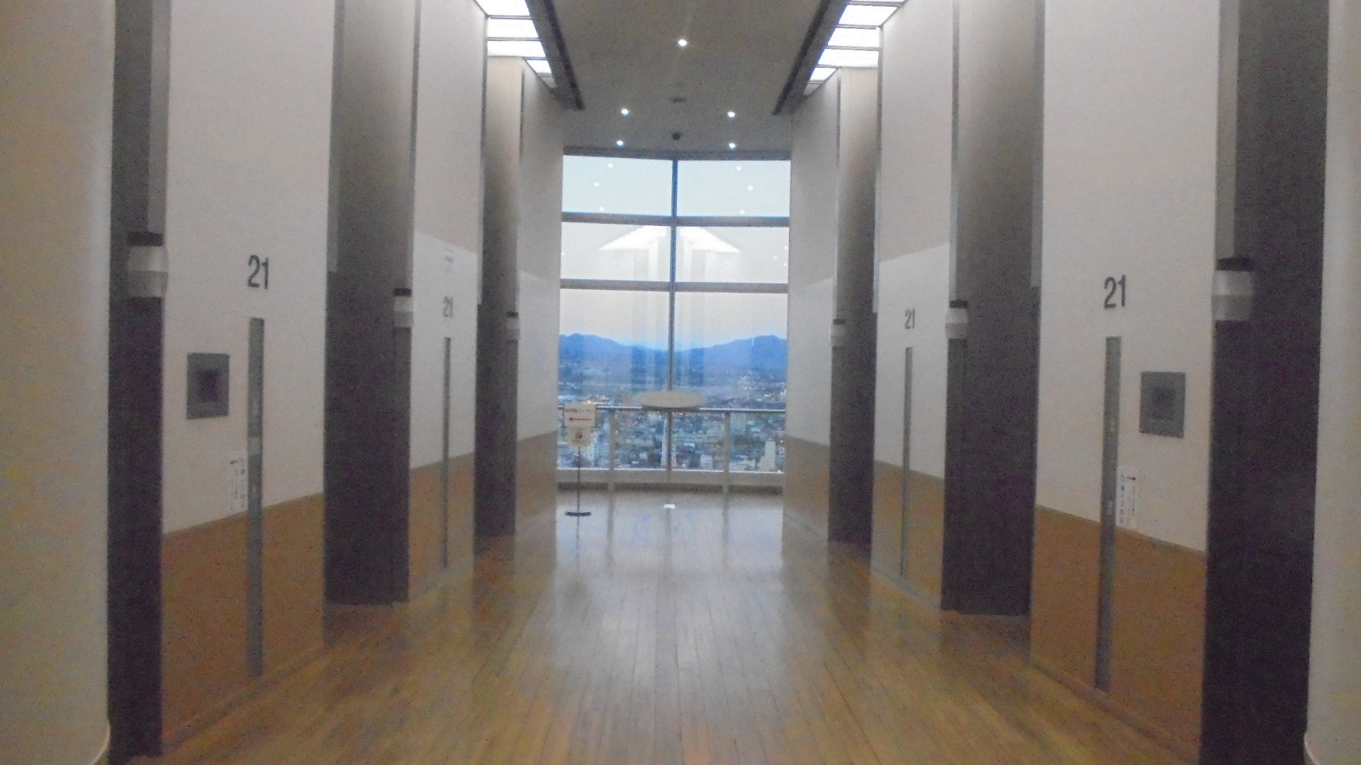 21階エレベーターホール